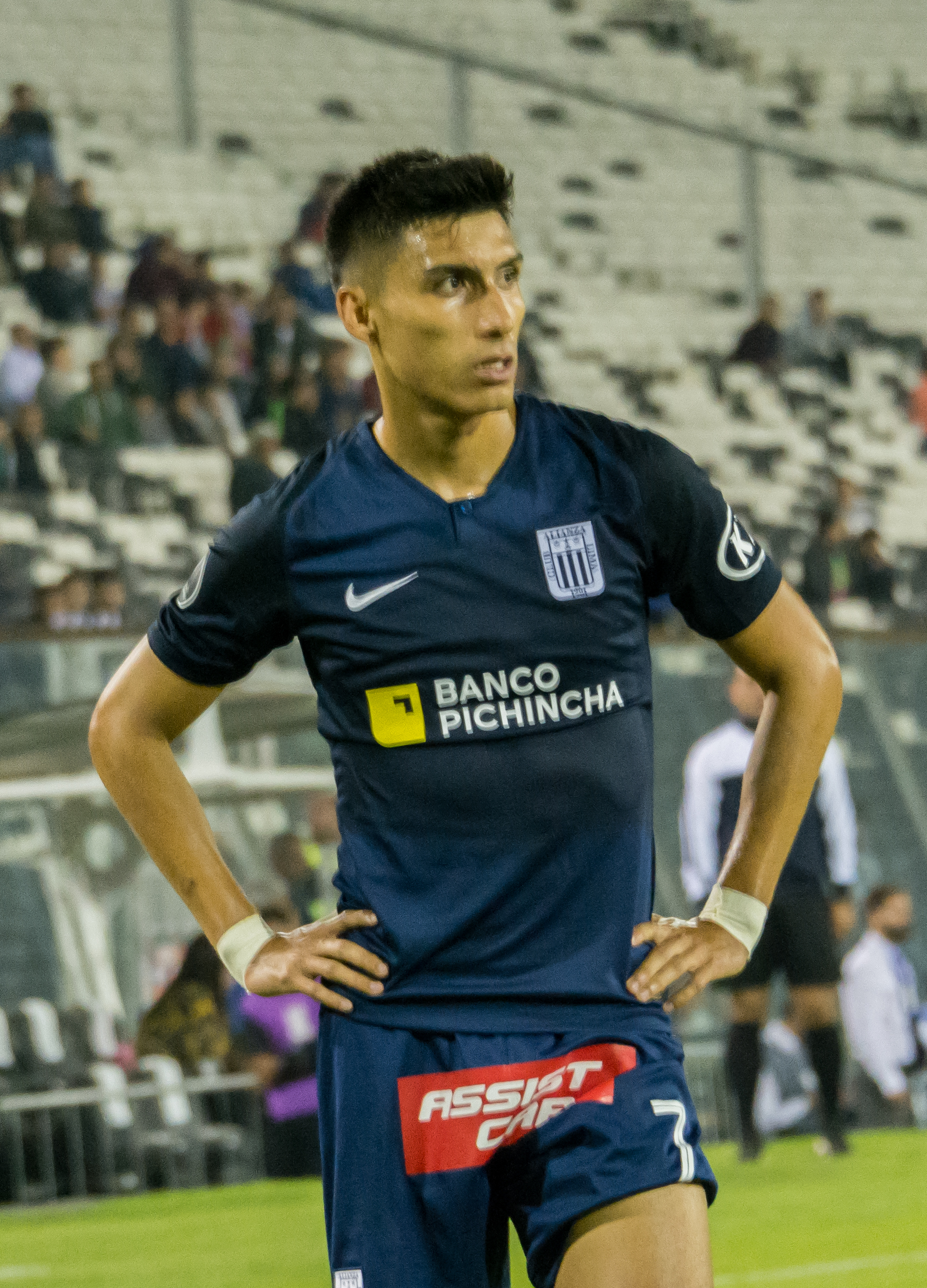 José Manzaneda, Palestino vs Alianza Lima, Estadio Monumental, Macul, Santiago, Chile.